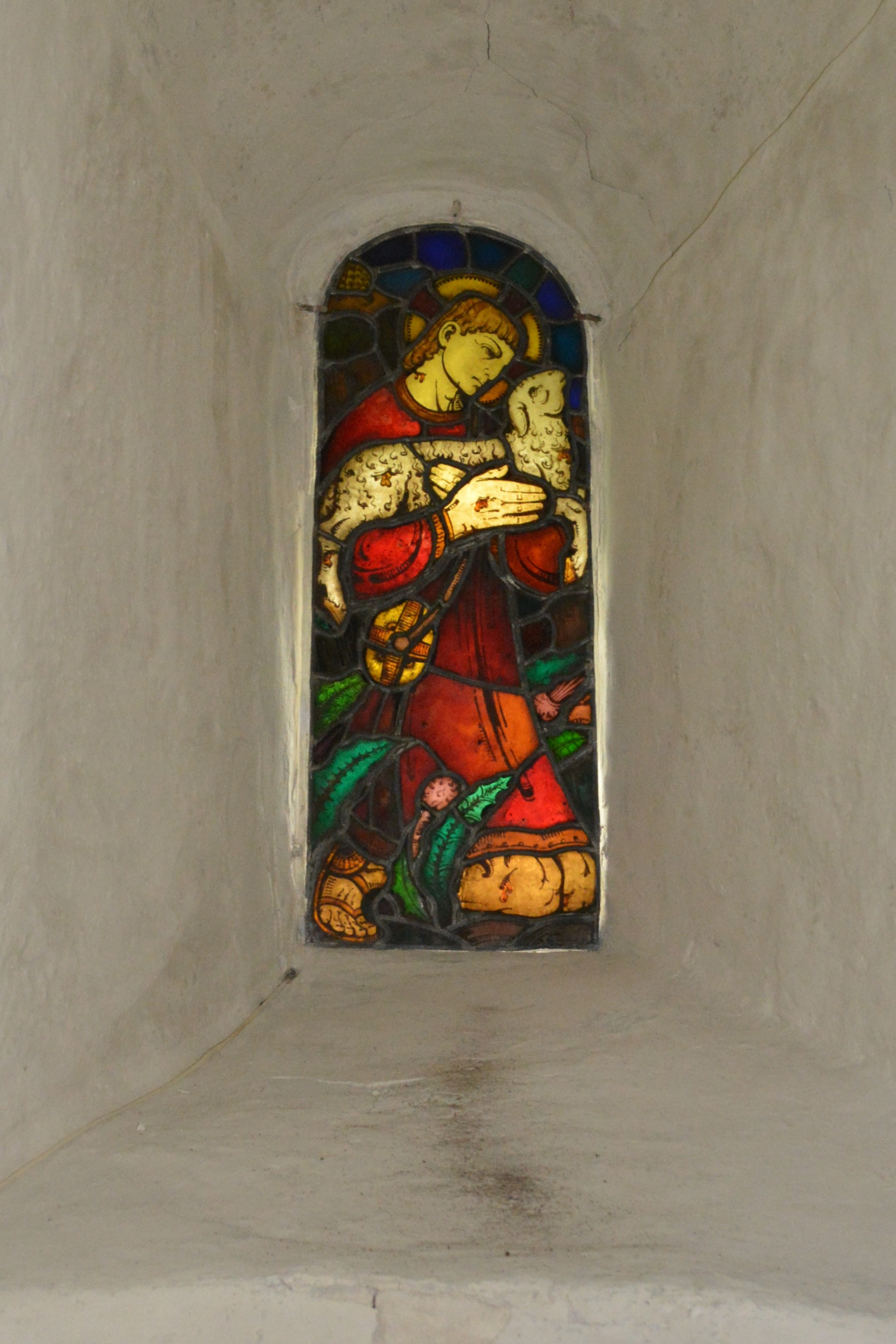 Hurum kirke: Glassmaleri av Per Vigeland (1953)